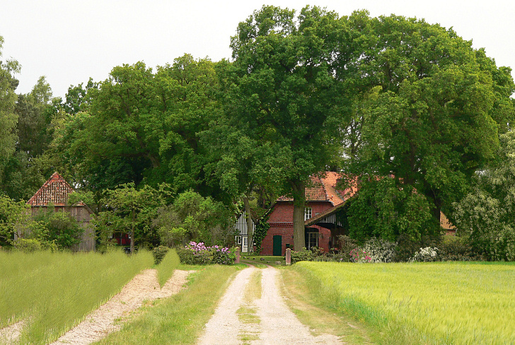 Hof Blankenburg